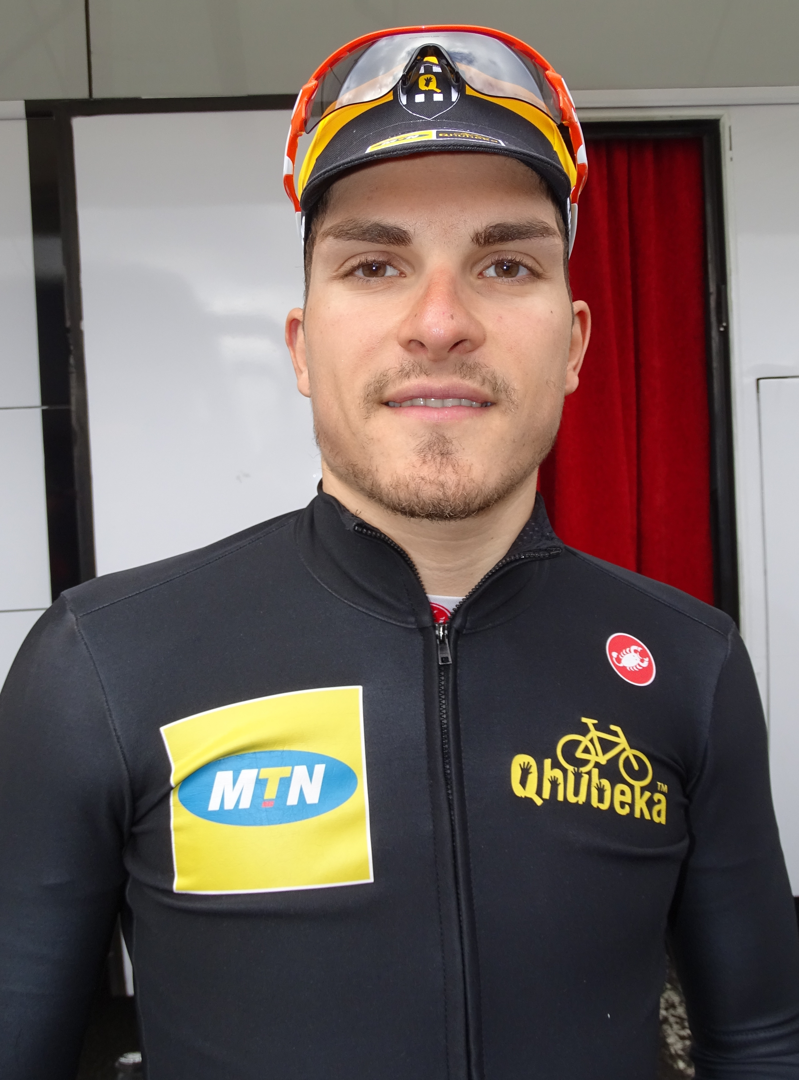 Reportage réalisé le mardi 31 mars à l'occasion de du départ de la première étape des Trois jours de La Panne 2015 à La Panne, Belgique.